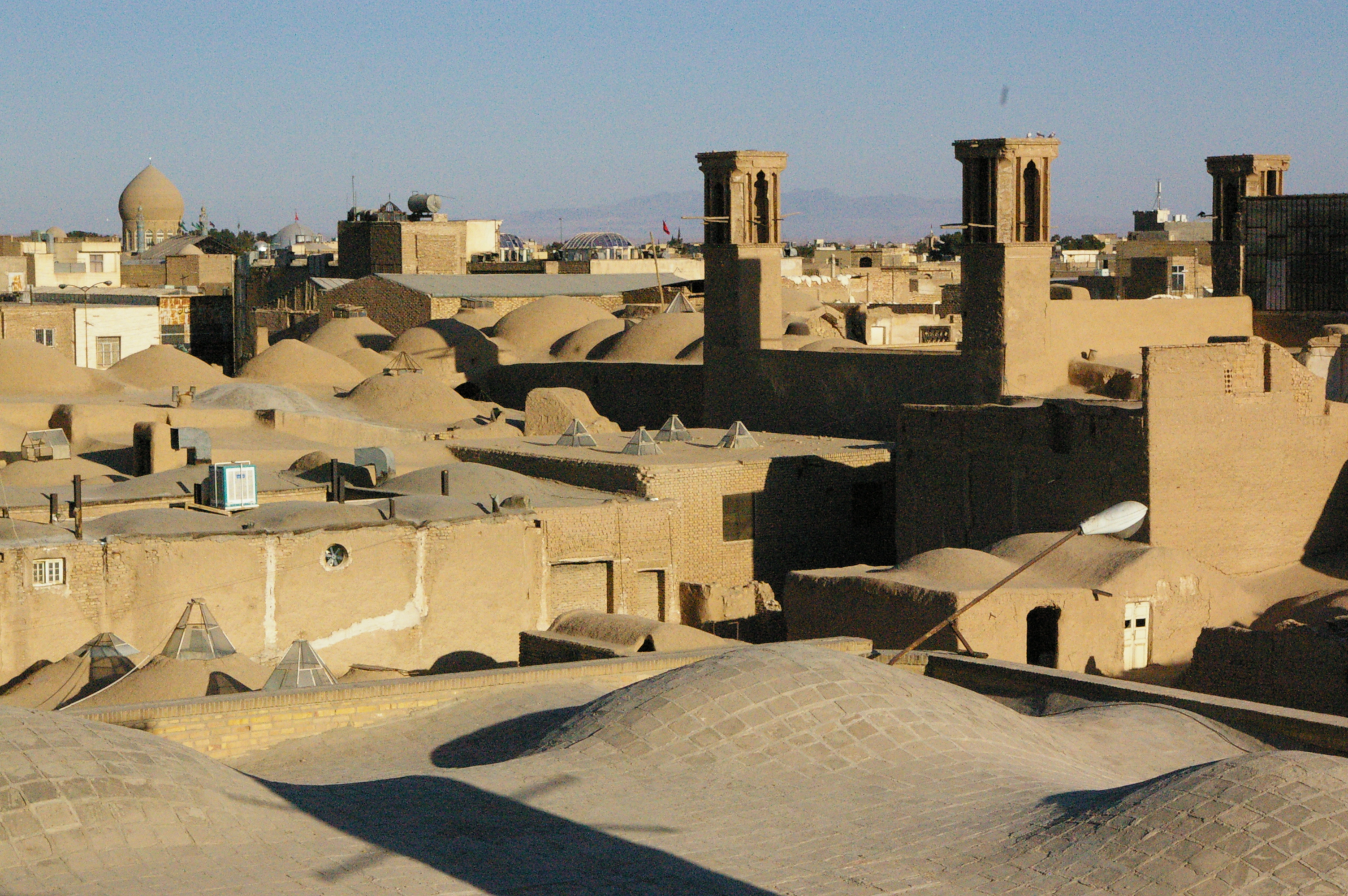 Blick vom Dach des Basars über Kashan